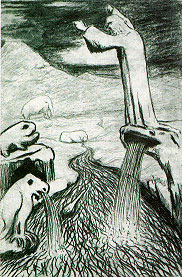 Zeichnung. Orginal titel: Profet i Urtidslandskap.